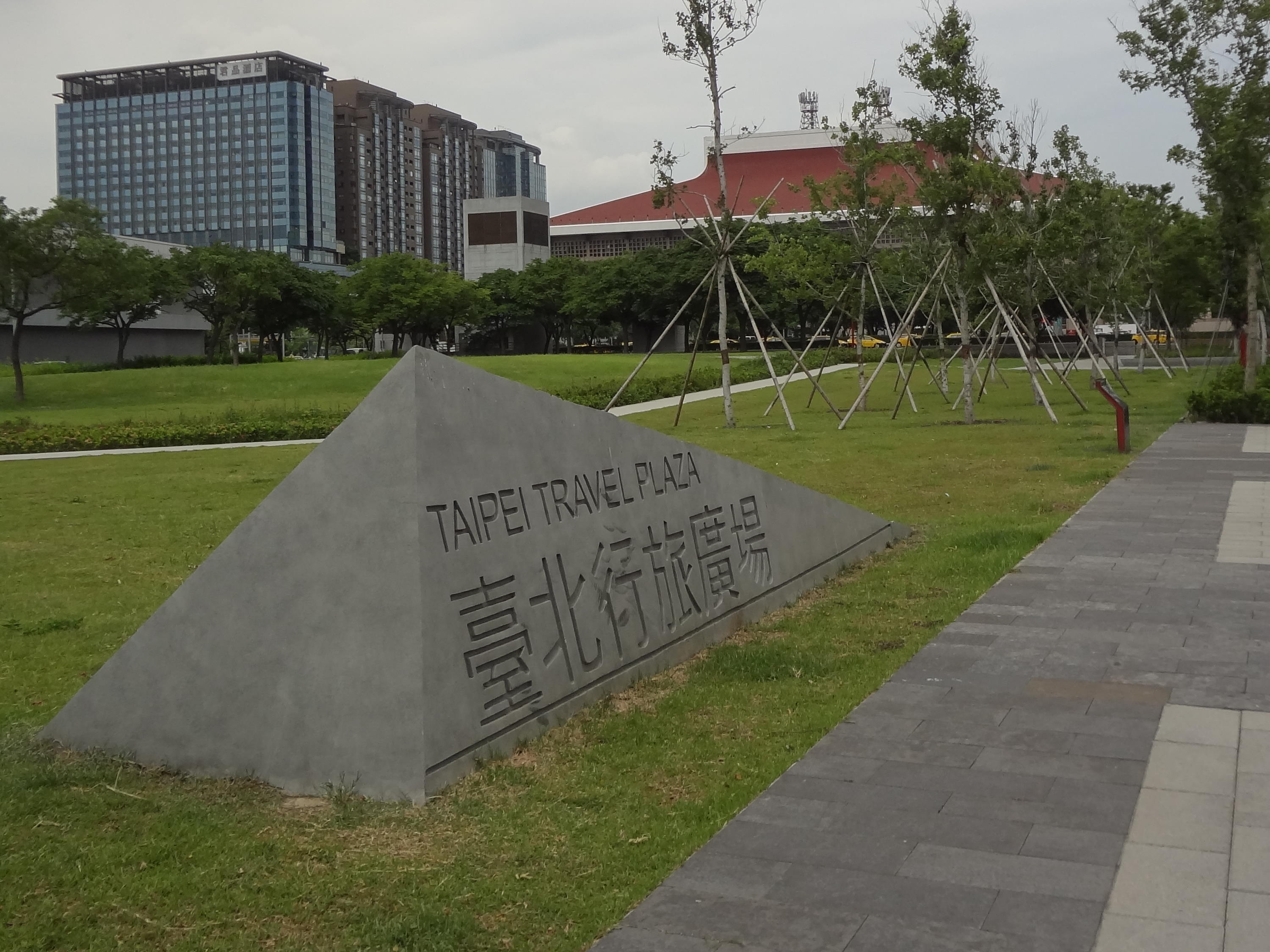 中文（台灣）: 臺北行旅廣場石碑，位於臺北西站B棟原址，正面朝向忠孝西路一段。左方建築為京站大樓，右方建築為臺北車站。